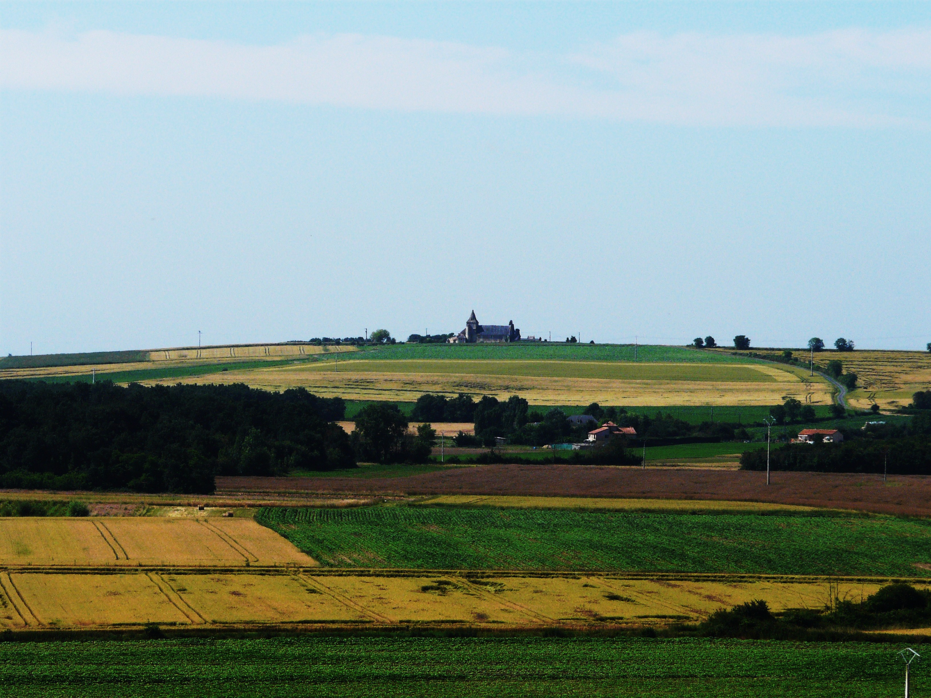 Dominant les cultures environnantes, l'église Saint-Léger-de-Montbrun